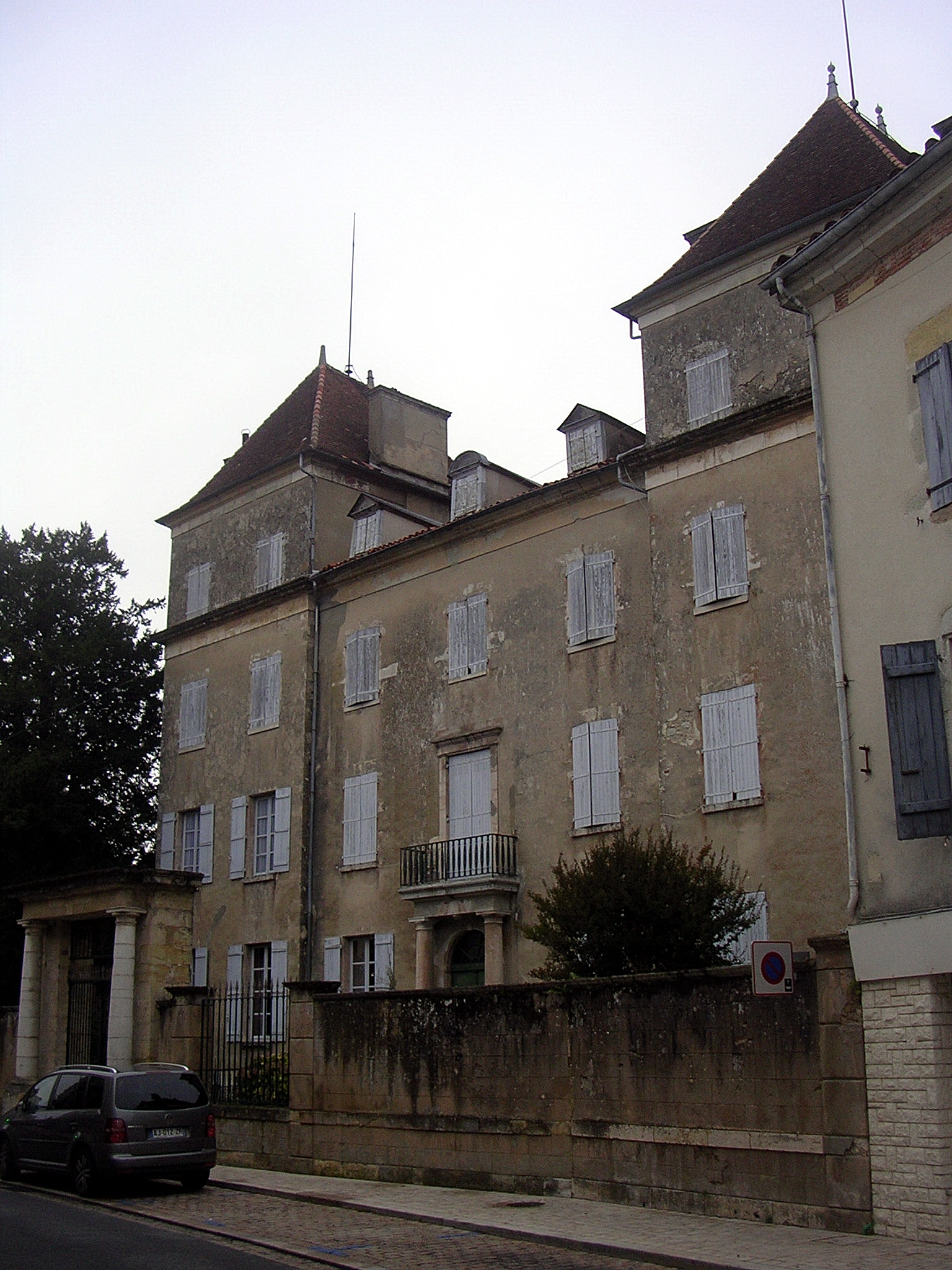 Château du Général Lamarque, à Saint-Sever (Landes, France)